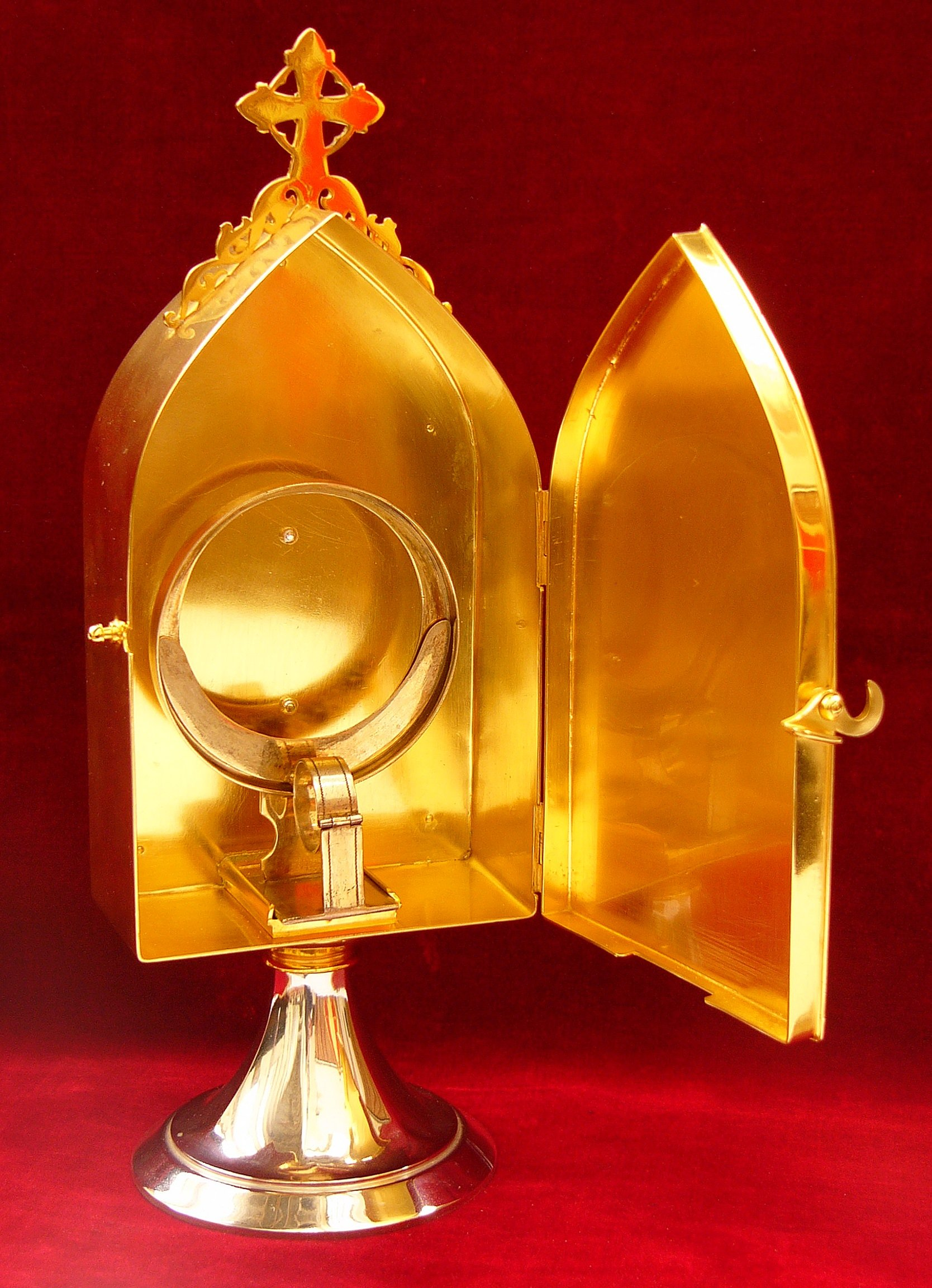 Eine offene Custodia mit Lunula.